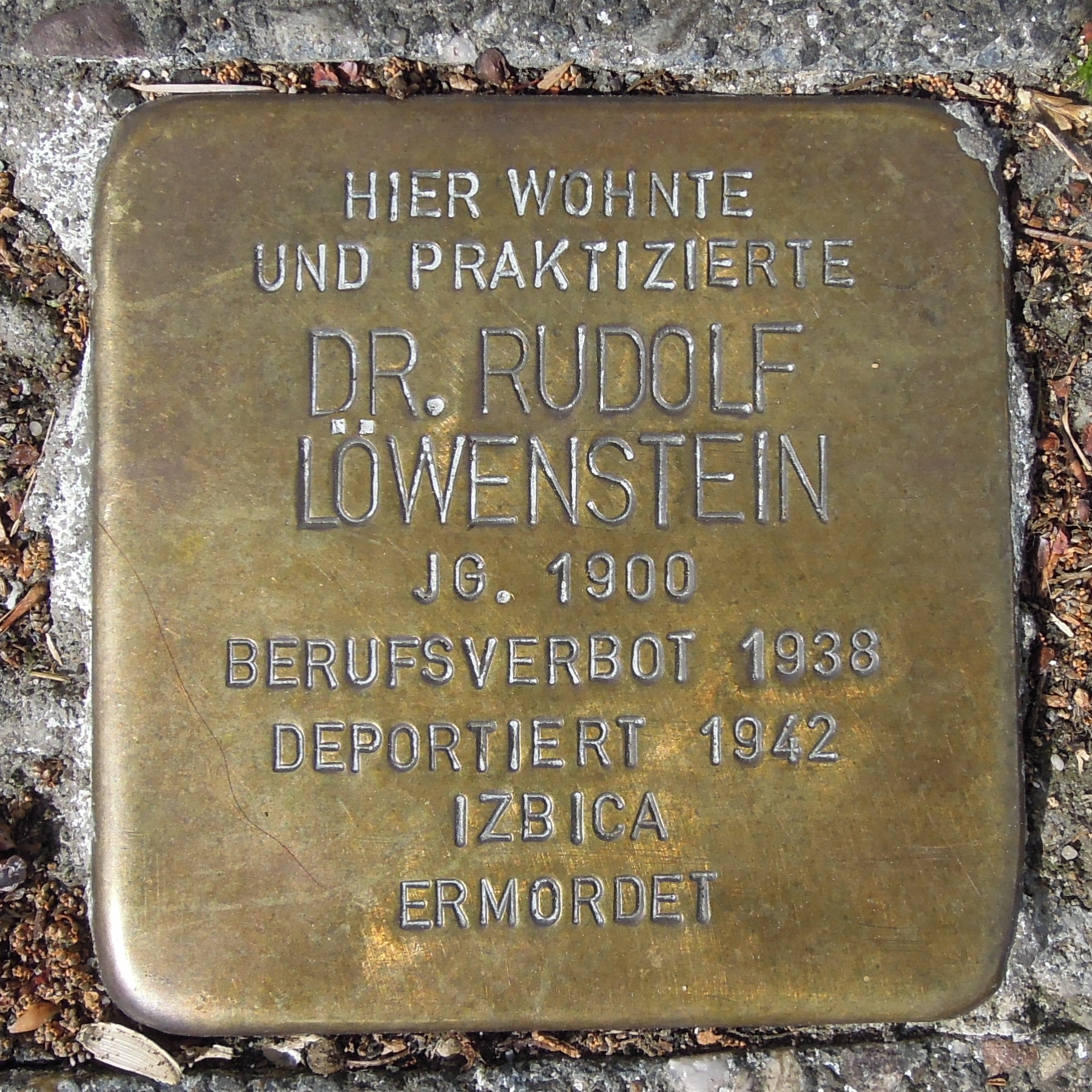 Stolperstein in Soest Hoher Weg 8 für Rudolf Löwenstein